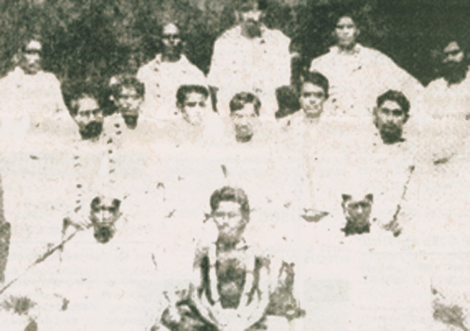 ജയിൽ മോചിതരായ വൈക്കം സത്യഗ്രഹികൾക്കു് നല്കിയ സ്വീകരണാവസരത്തിൽ എടുത്ത ചിത്രം